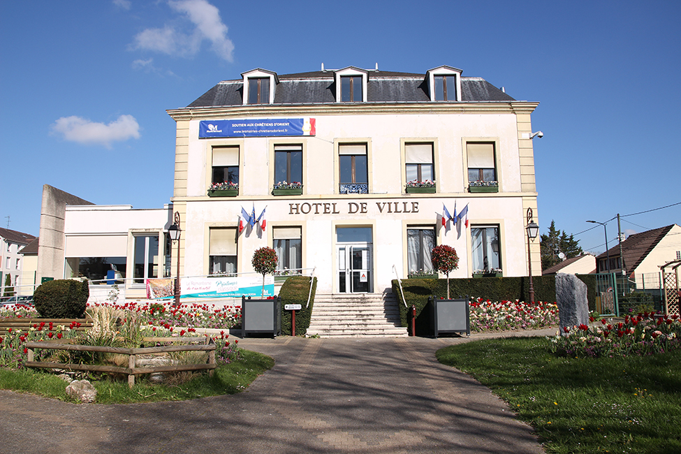 Façade mairie Montfermeil hôtel de ville